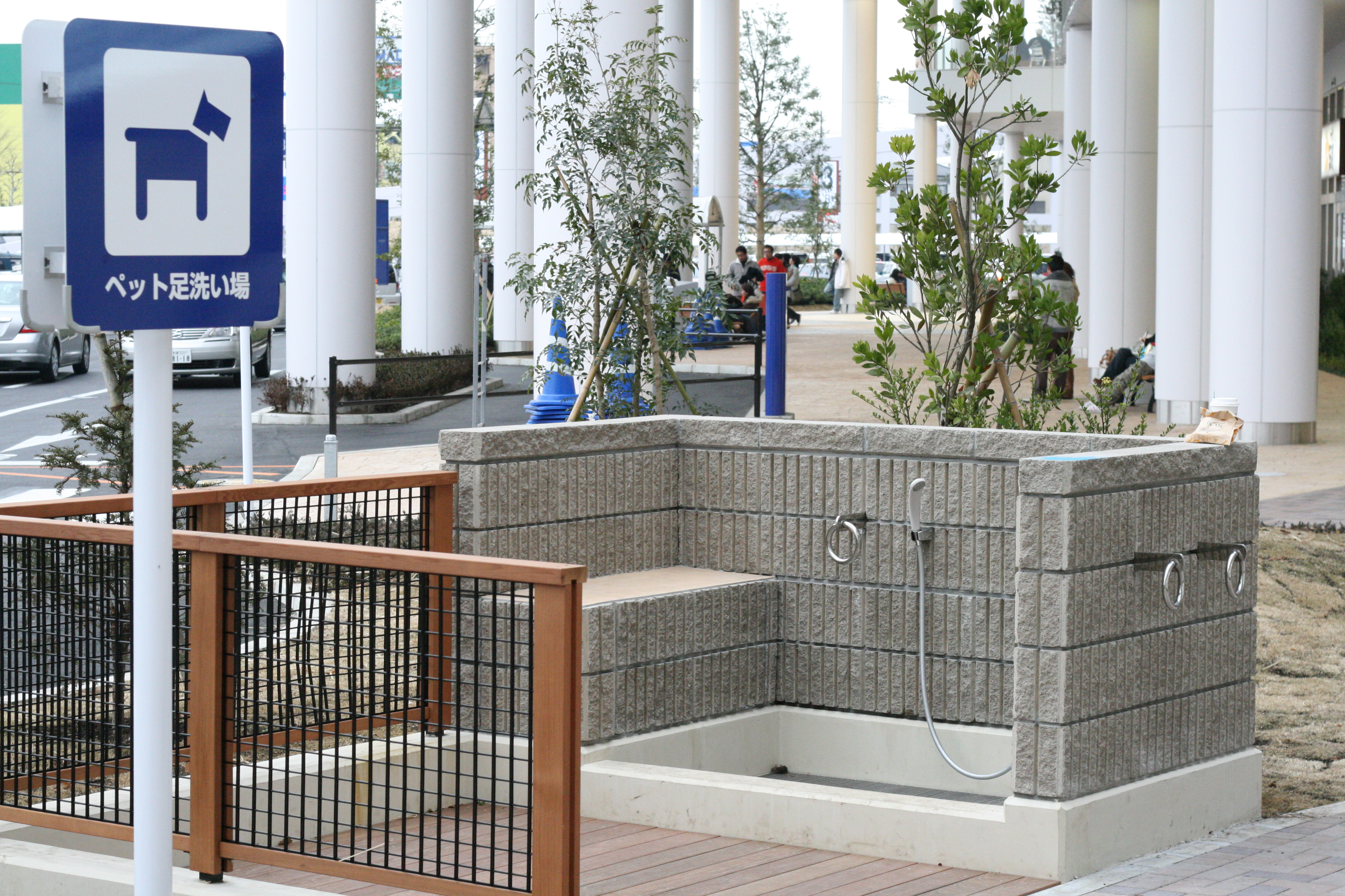 WTF. ペット用足洗い場 ダイヤモンドシティ・ミュー (現在のイオンモールむさし村山)